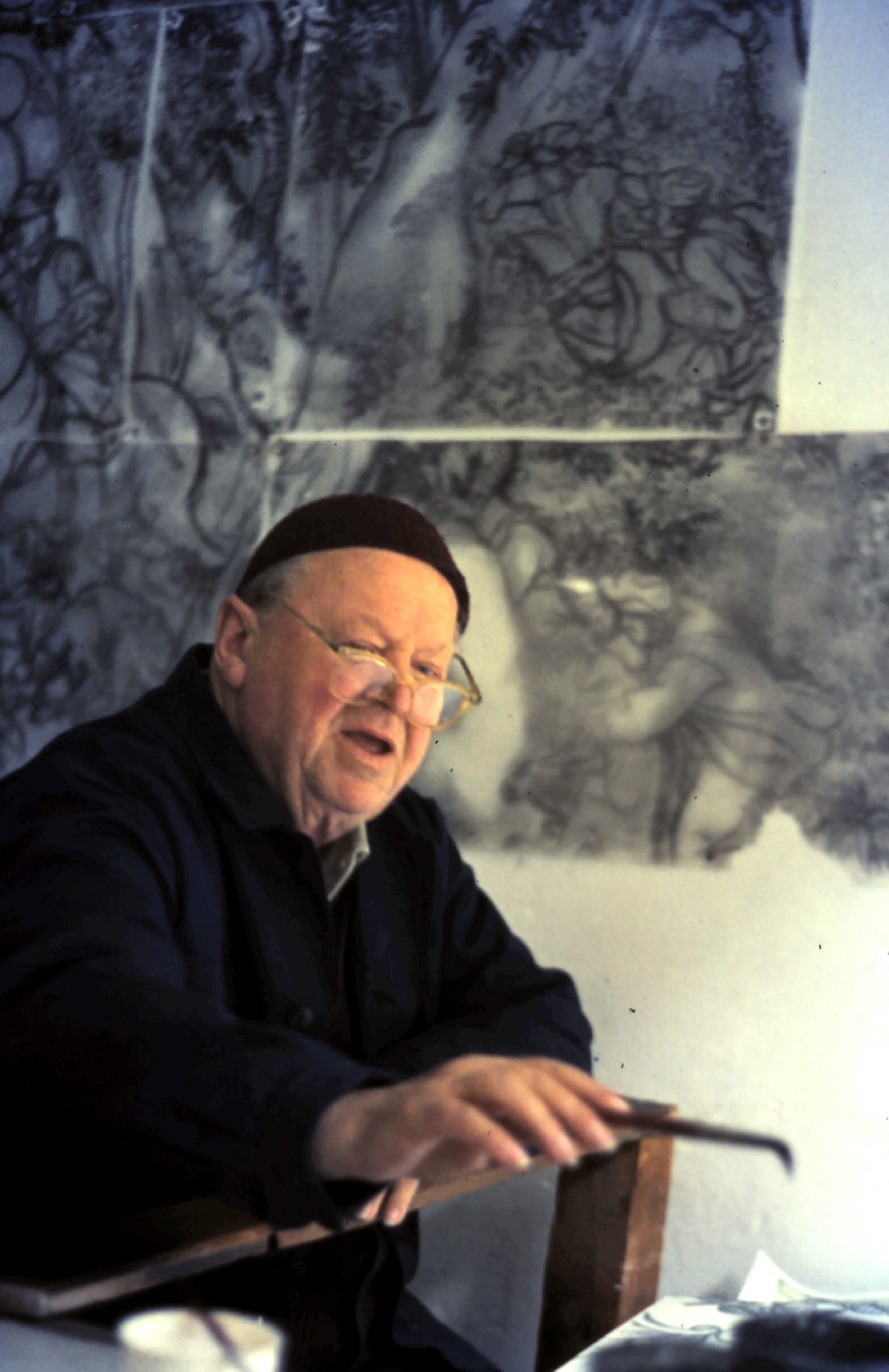 Karl M. Adlmannseder bei seiner Arbeit als Keramikmaler